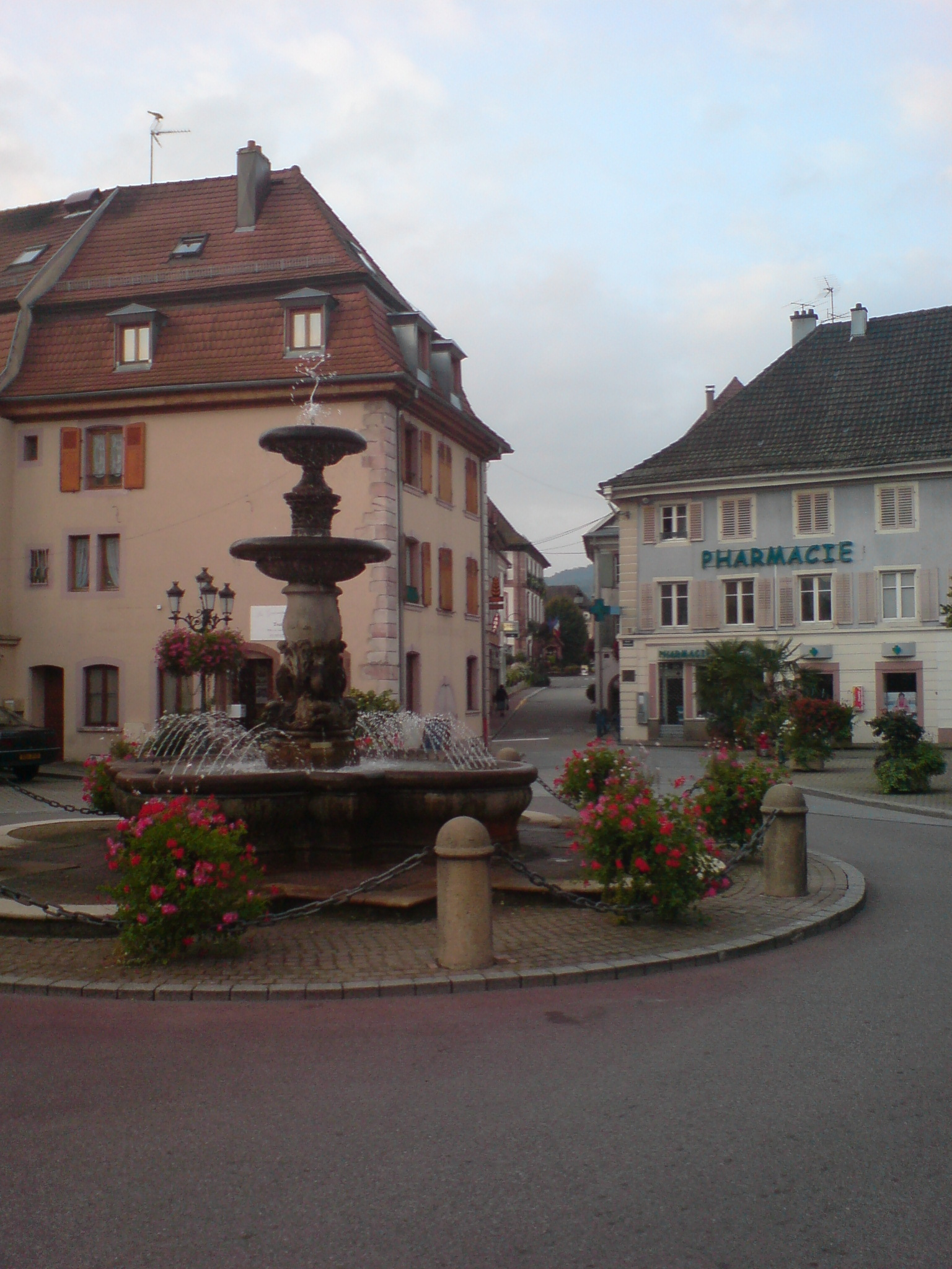 Masevaux fountain, Place Clémenceau (